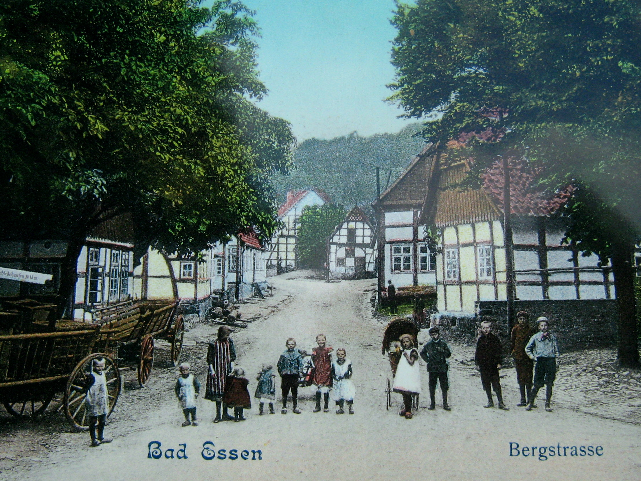 Alte Dorfstraße um 1900